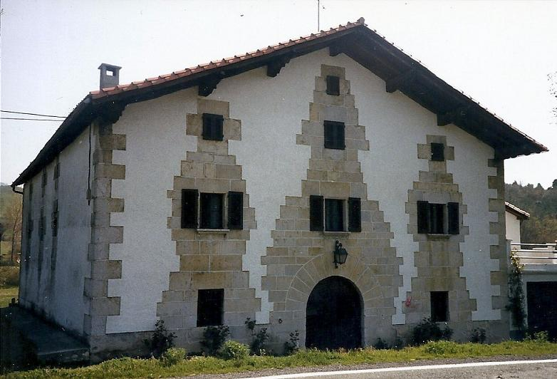 Larrunbe (Nafarroa Garaia)